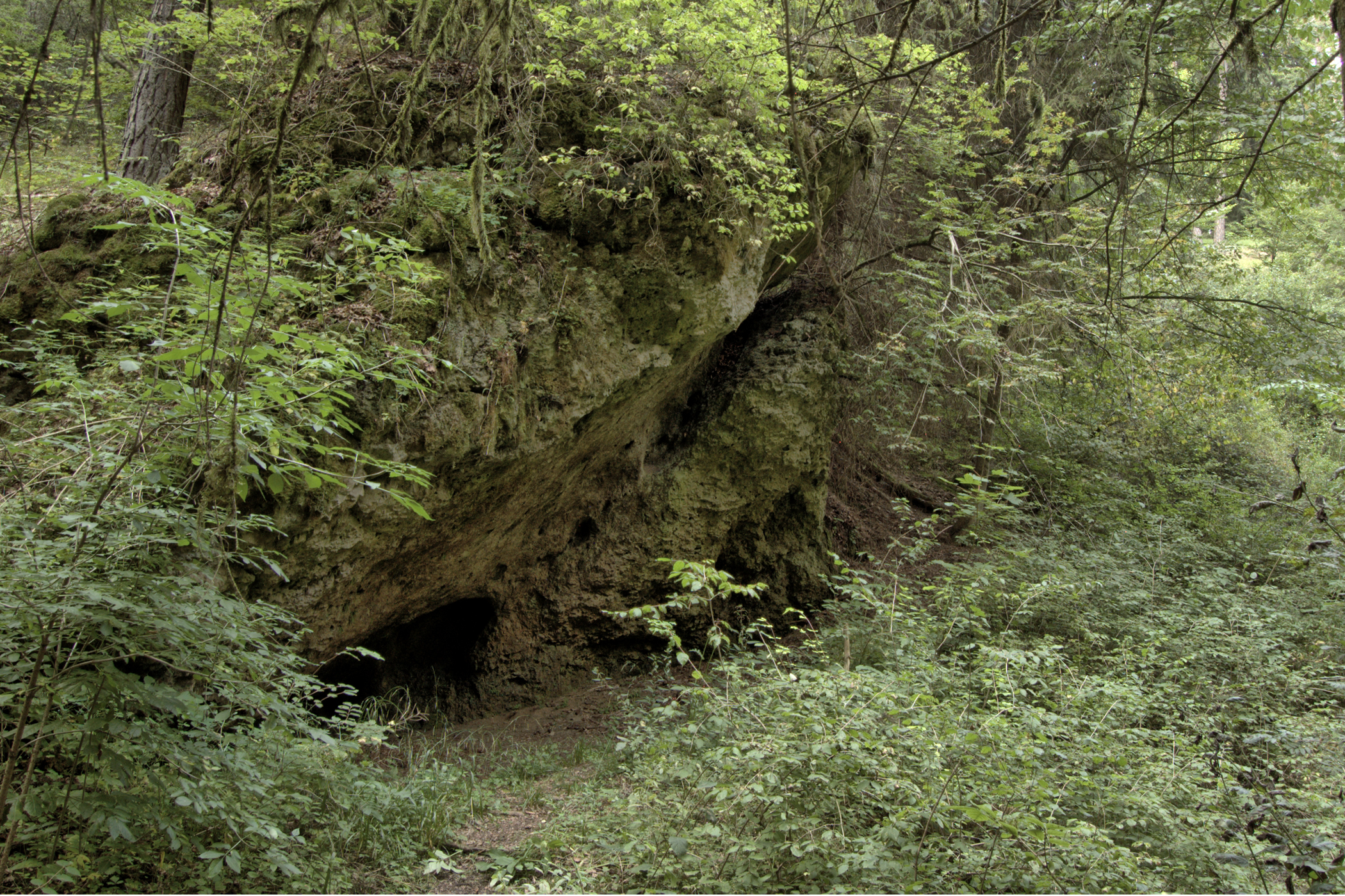 Das steinzeitliche Abri Schräge Wand im Bärental